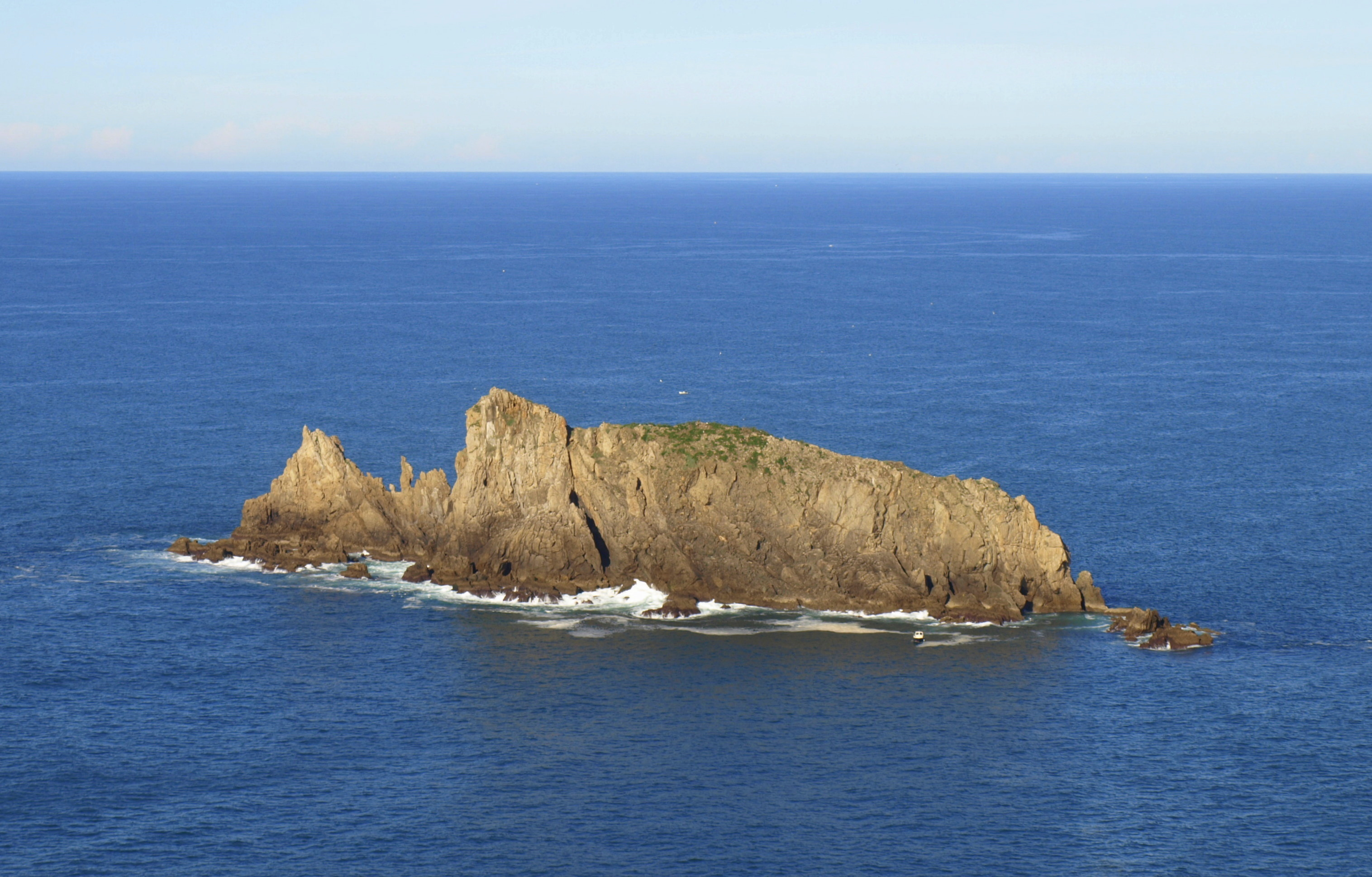 Isla Villano (Billano Uhartea, Isla del Fraile) el apodo le viene de su forma vista desde el mar, que semeja a un grupo de frailes cubiertos por las capuchas de sus hábitos. Sita en Górliz (Vizcaya) frente al cabo villano (que tiene un faro) es inhóspita y de tan sólo 1'8 hectáreas. Es muy conocida por su característica forma de dragón recostado. Su única vegetación es una tenue capa herbácea. En la zona del faro de cabo villano se puede visitar un antiguo destacamento de artillería de costa que aún conserva uno de sus cañones y una serie de galerias subterraneas (que comunican las baterías con la dirección de tiro) situada en la ladera del acantilado a la altura de la linterna del faro.